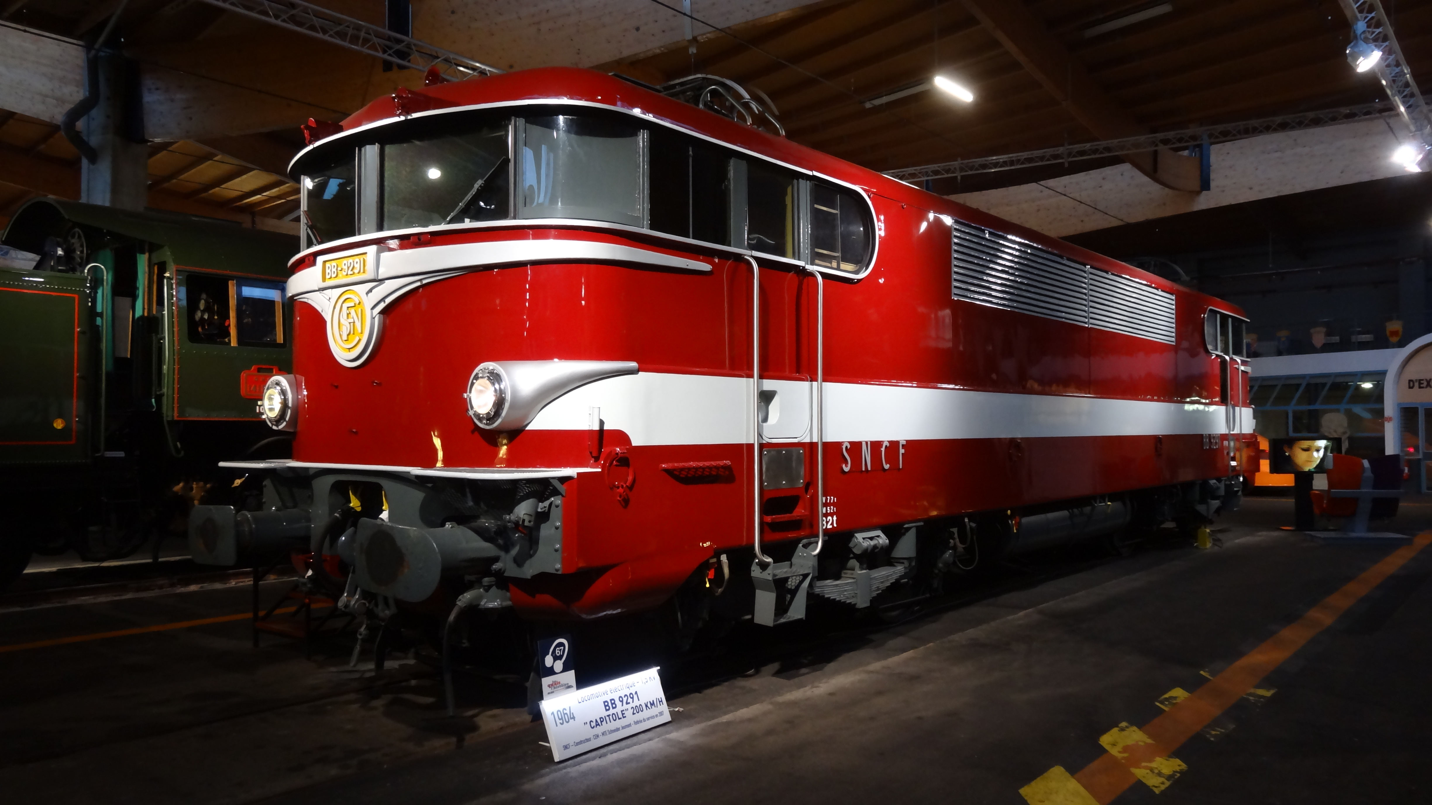 Cite du Train Mulhouse 2014 138